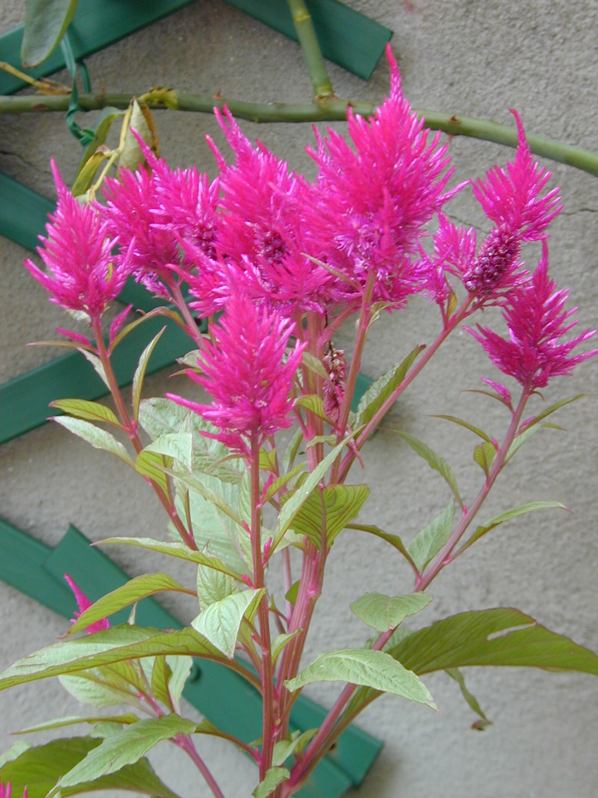 celosia caracas flowers